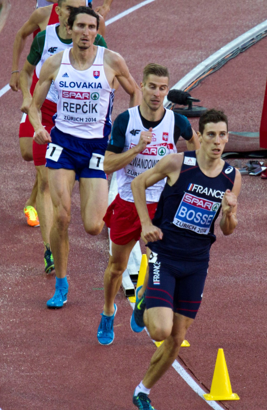 99124 finale 800m mannen